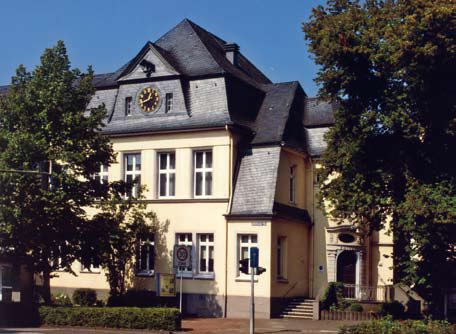 Das historische Rathaus der Kreisstadt Bergheim This is a photograph of an architectural monument.